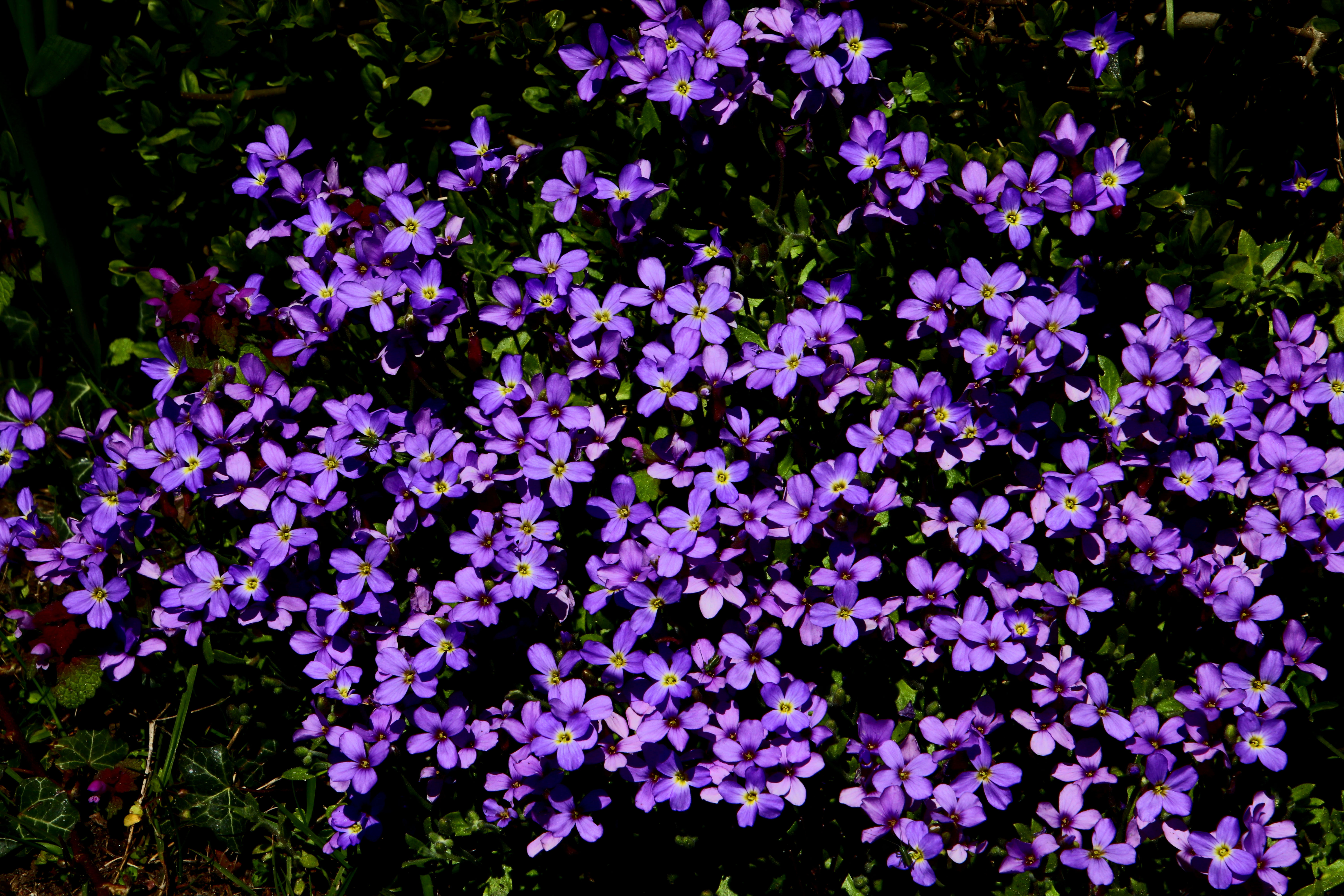 Vordingborg. Ved Rosenfeldt Gods.